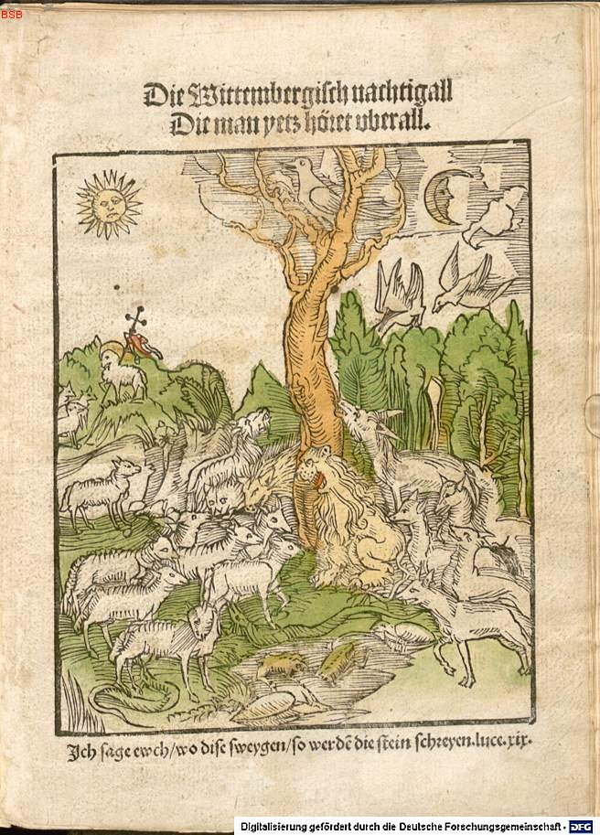 Sachs, Hans: Die Wittembergisch Nachtigall, Die man yetz höret uberall [Bamberg] [1523] [VD16 S 647] Bildunterschrift: "Ich sage ewch/ wo dise sweygen/ so werden die stein schreyen. luce. xix." (vgl.